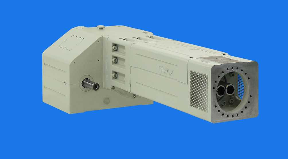 HENSCHEL Doppelschnecken-Extrudergetriebe